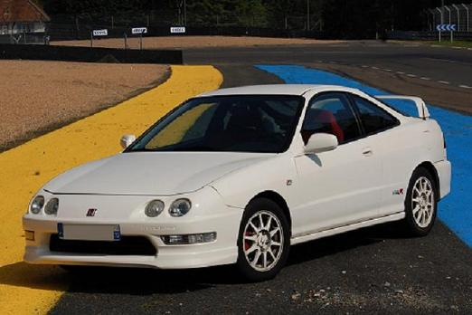 photo prise au mans